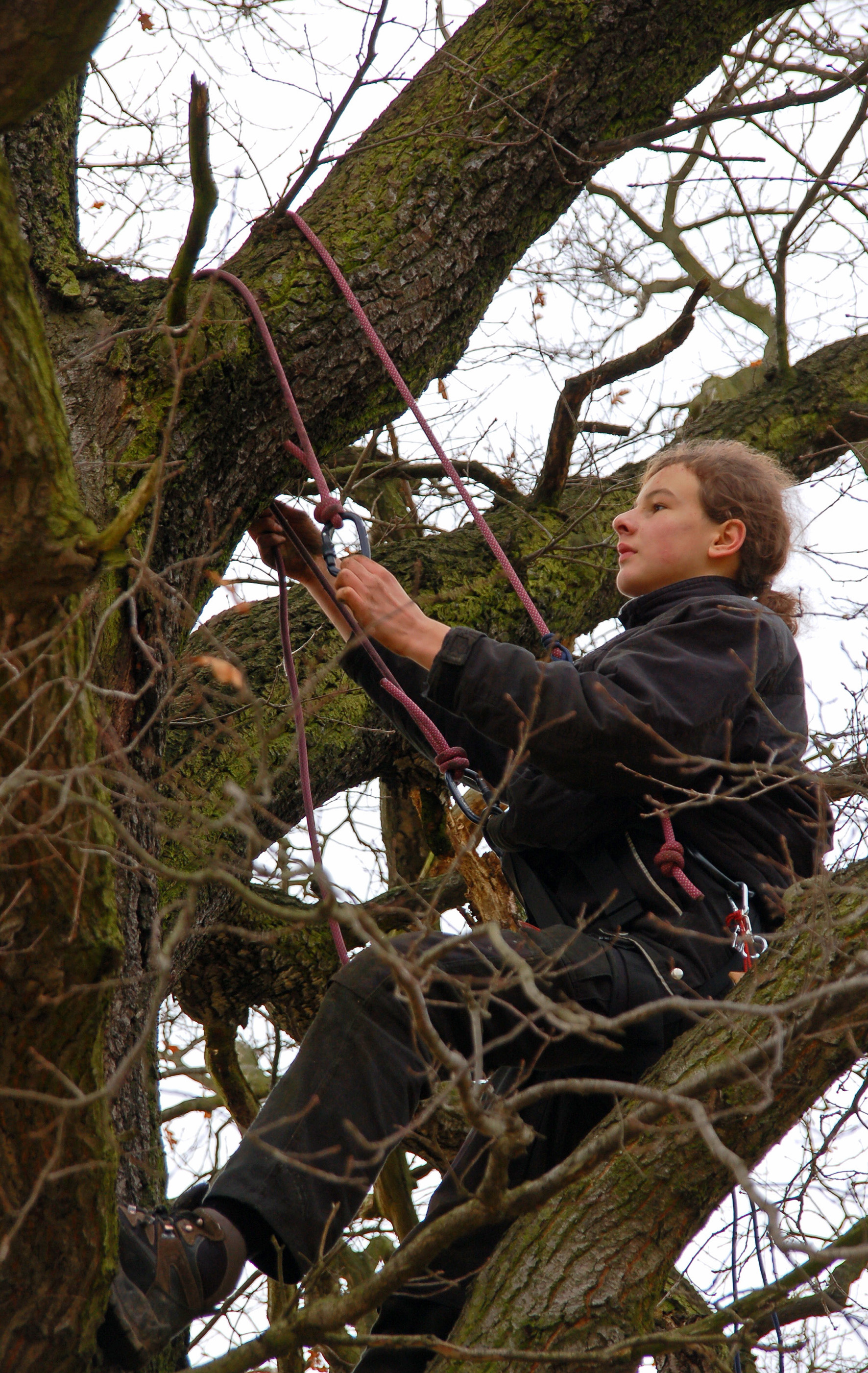 Baumklettern in Eiche